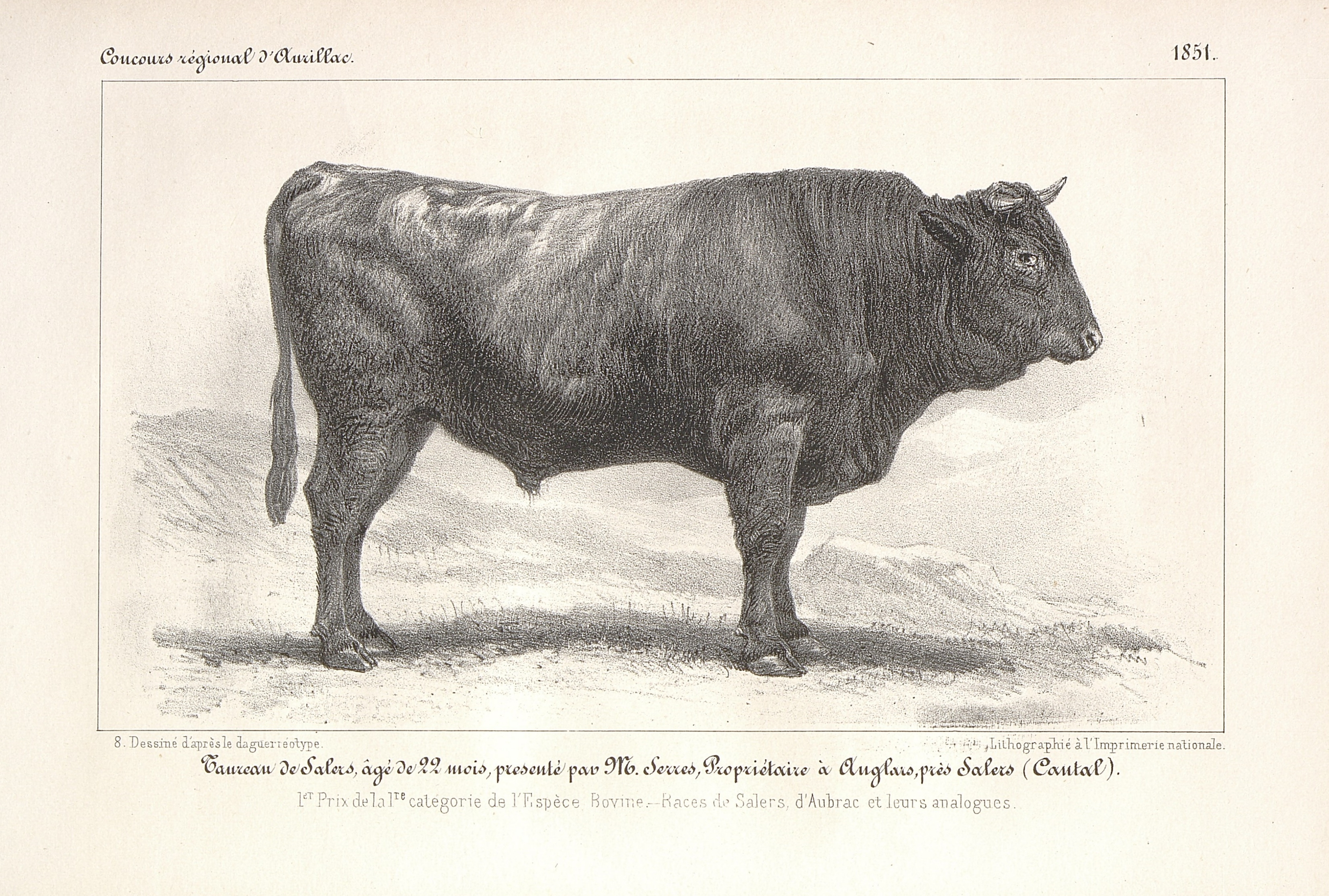 Illustration extraite de "Concours régionaux d'animaux reproducteurs, d'instruments, machines, ustensiles ou appareils à l'usage de l'industrie agricole et des divers produits de l'agriculture ou des différentes industries agricoles tenus à Saint-Lô, à Aurillac et à Toulouse et concours national de Versailles", Paris, Imprimerie nationale, 1851, p. 129. Ouvrage appartenant à la Bibliothèque historique du ministère de l'Agriculture, déposée à la MRSH Caen. Fichier : UNICAEN_MRSH_Bovin_568_AF_1851_66_1851_129